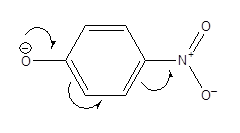 Fig. 4 - Ilustração da conjugação cruzada entre o grupo nitro (substituinte) que estabiliza o fenóxido gerado.